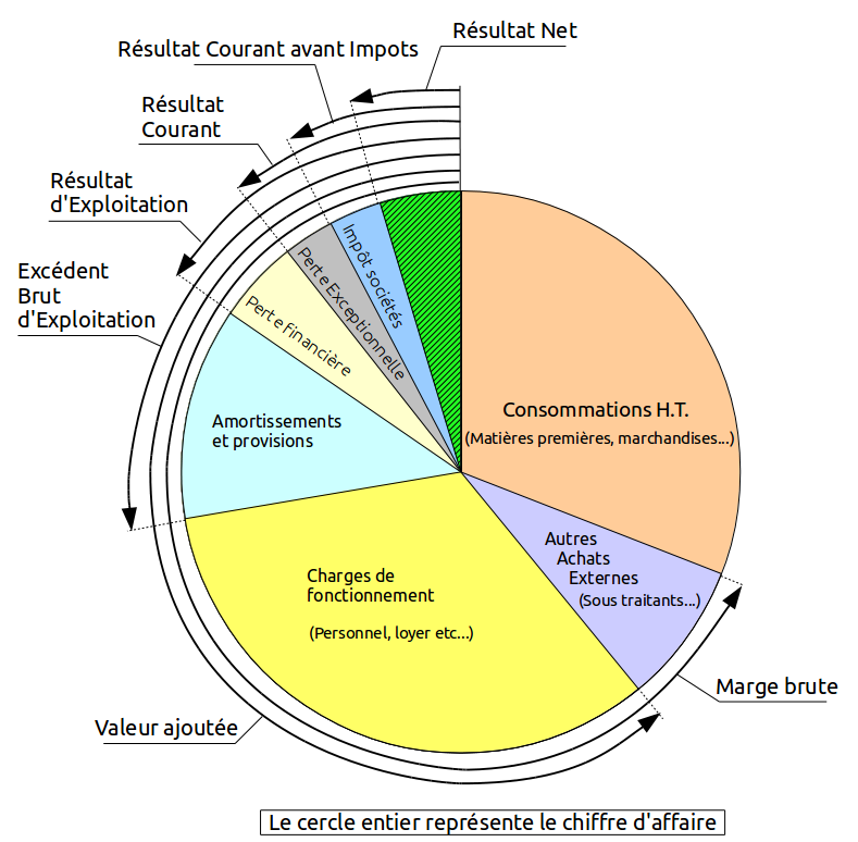 Ce fichier decrit les Soldes Intermediaires de Gestion d'une entreprise. Il met a jour le fichier SIG.png qui avait ete uploade en 2003.